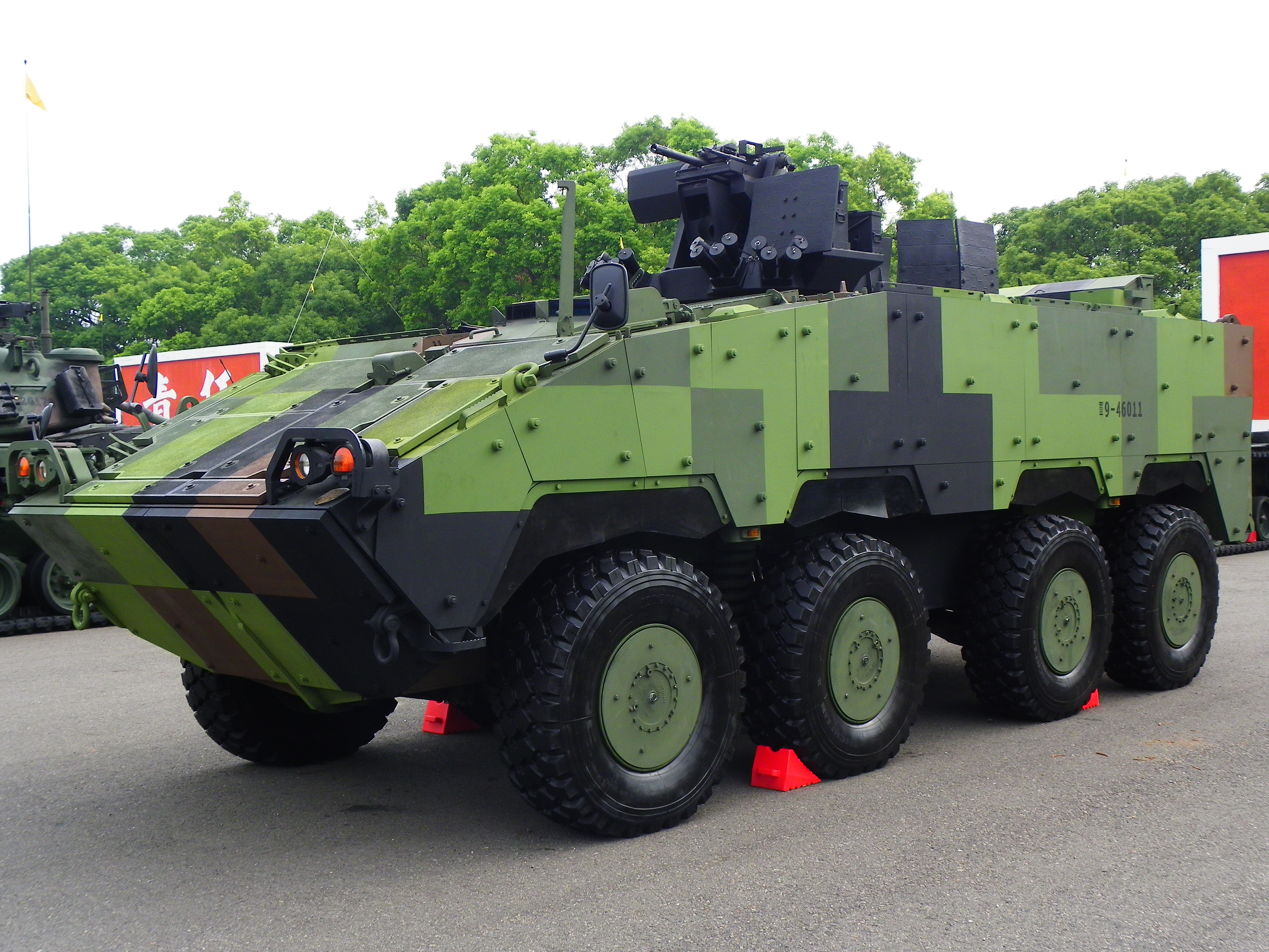 2011年成功嶺營區開放活動，展示之雲豹裝甲運兵車。